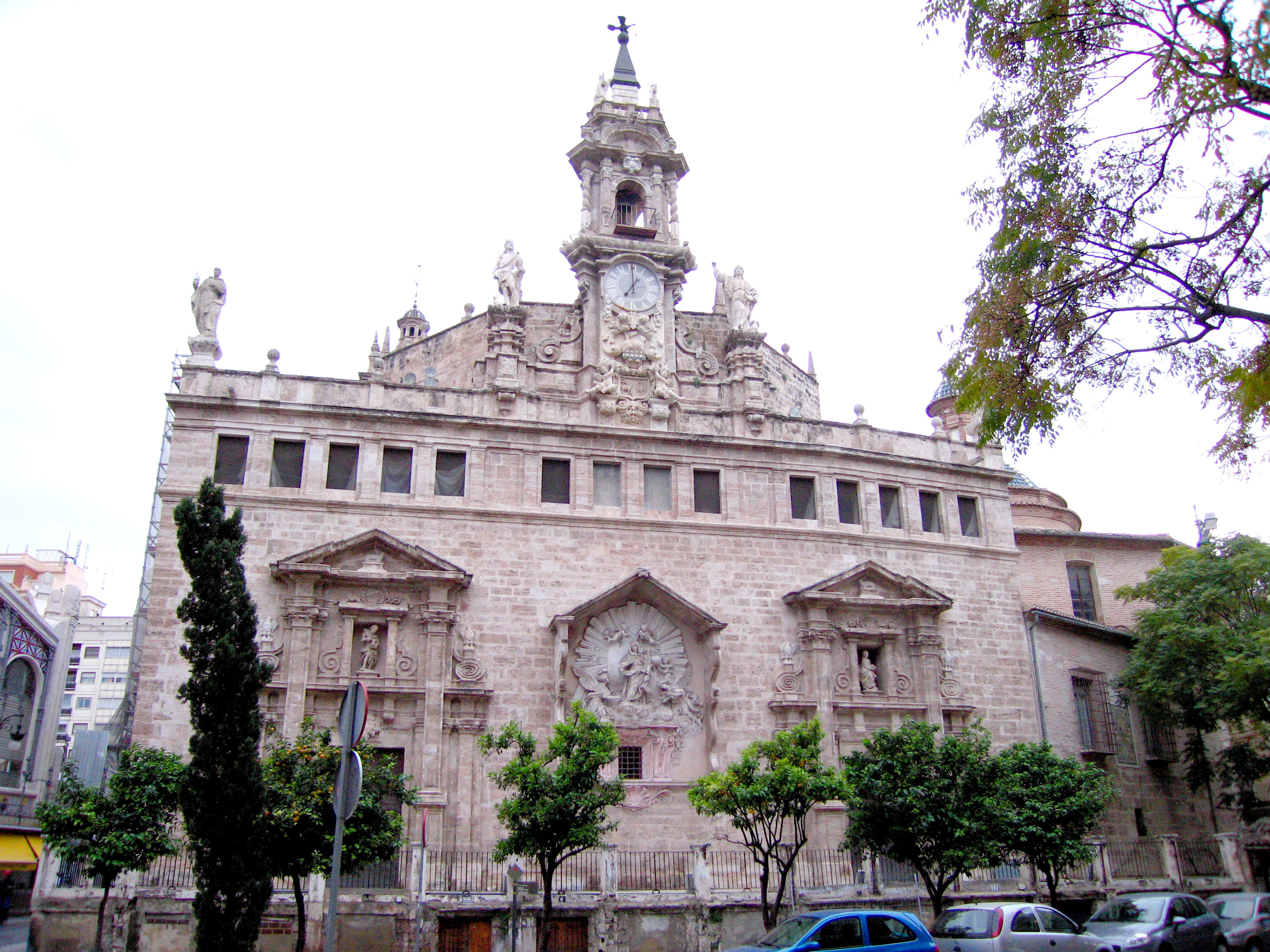 Vista de Sant Joan del Mercat des de la Plaça del Mercat. València, Spain